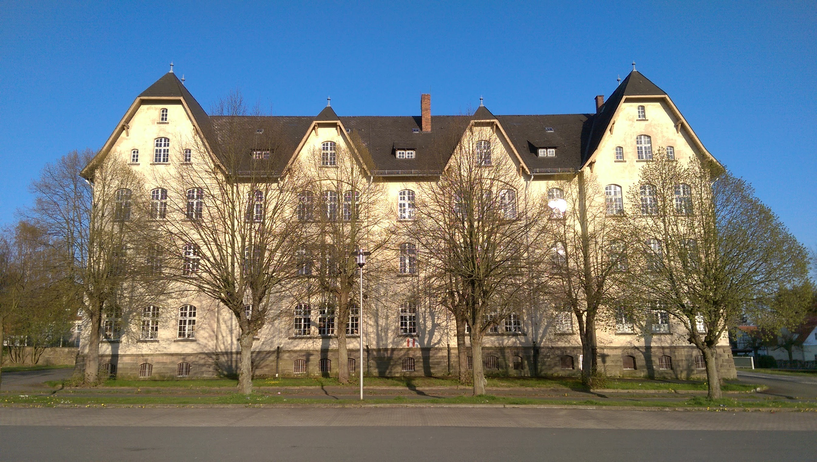 Arobella Therme Arolsen